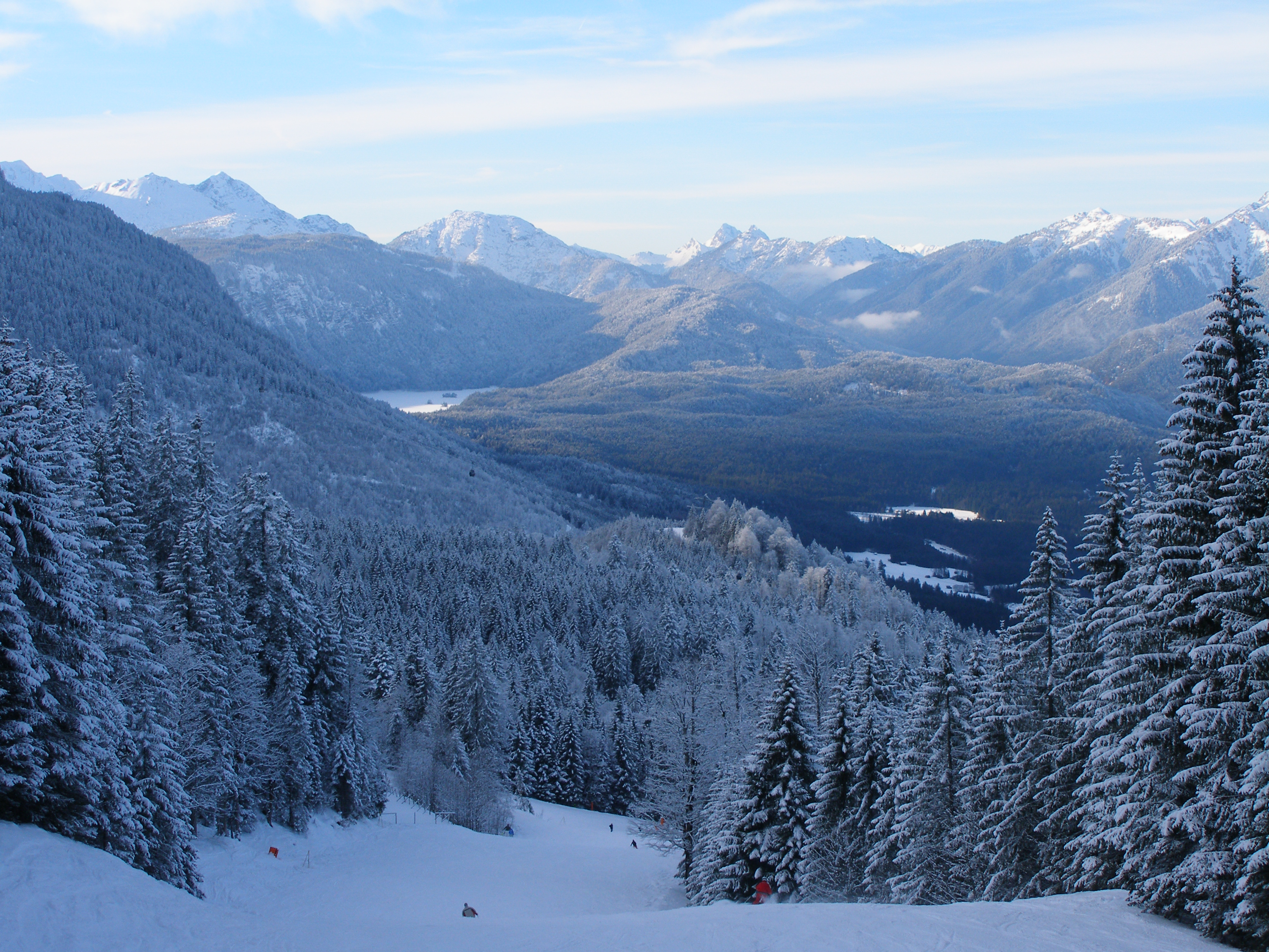 Kandahar Abfahrt mit einmaligem Blick